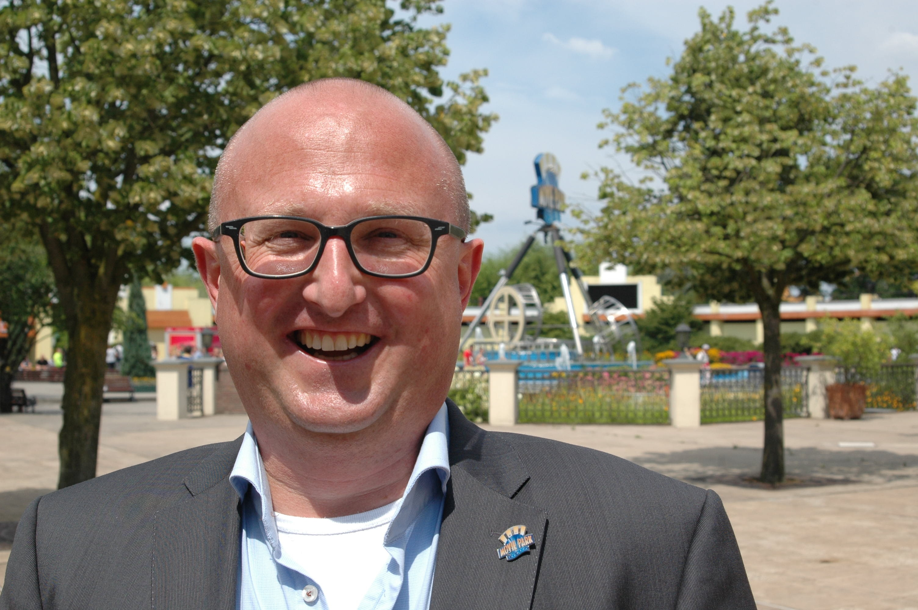 Geschäftsführer des Movie Park Germany, bei der Presse-Eröffnung von "The Lost Temple" in Bottrop